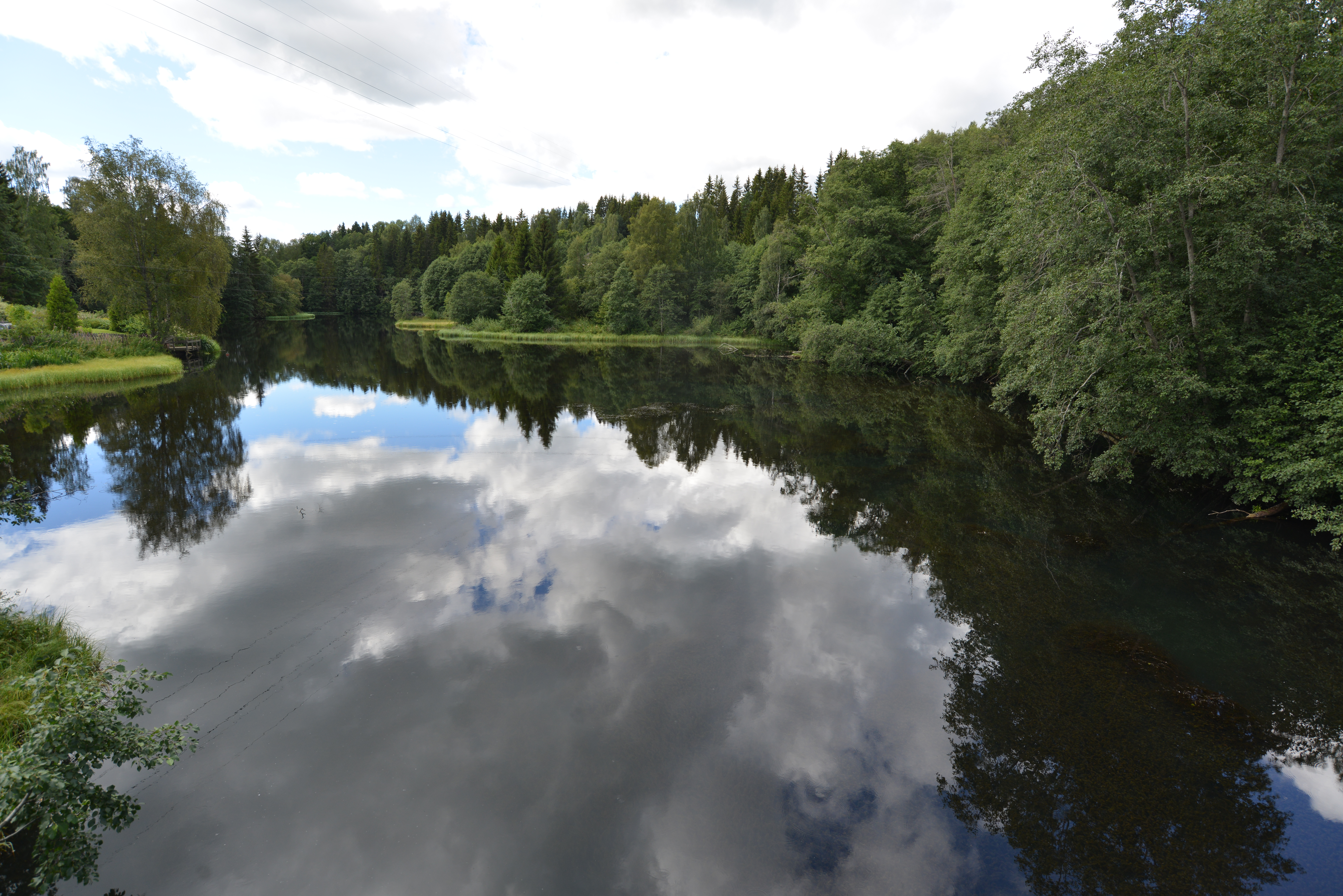 Elven Risa ved FV454 rett før man kommer til Dal sentrum